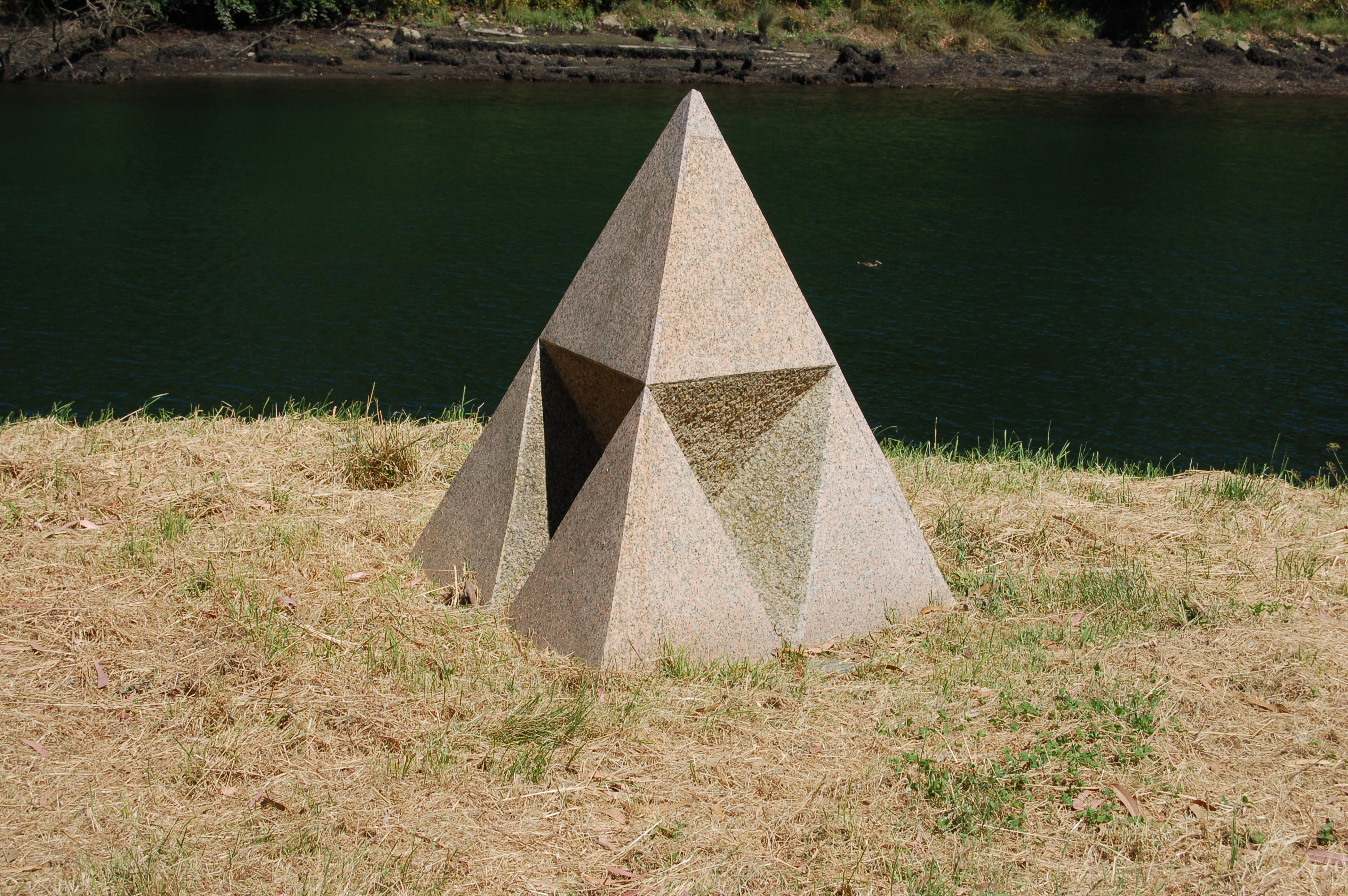 Pyramid, estatua de Dan Graham na Illa das Esculturas Categoría:Imaxes de Pontevedra